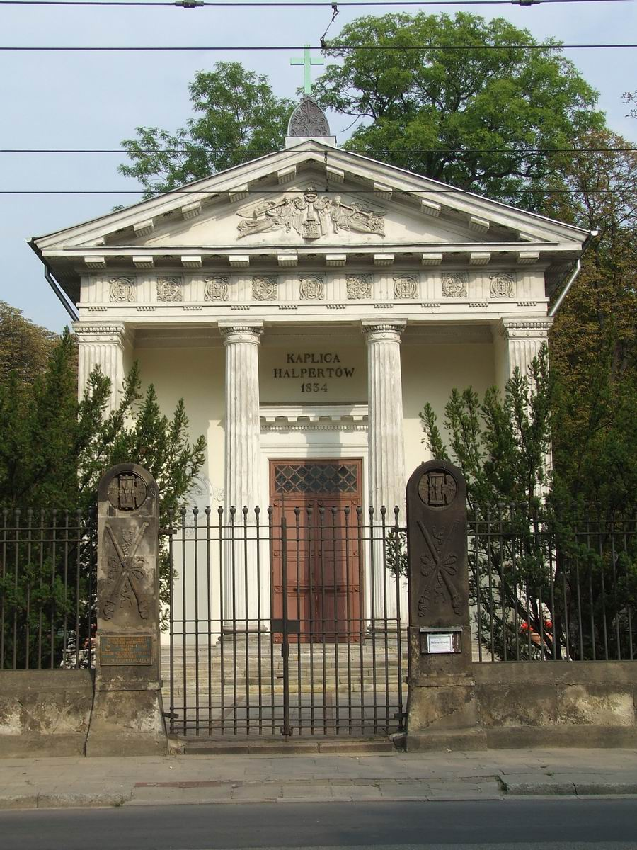 Kaplica Helpertów, Cmentarz Ewangelicko-Augsburski w Warszawie